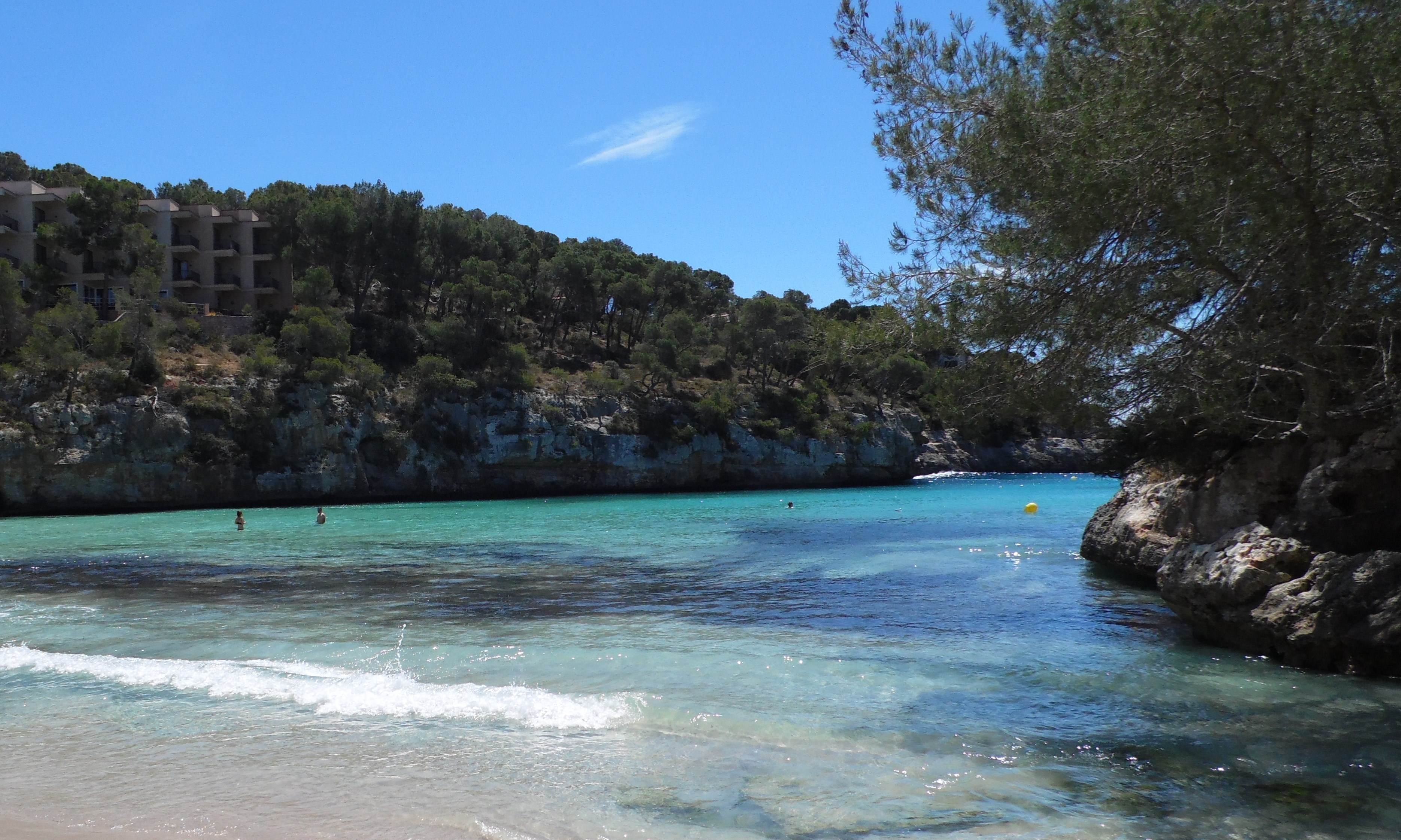 Plaża CALA SANTANYI - Santanyi - Majorka - Hiszpania.